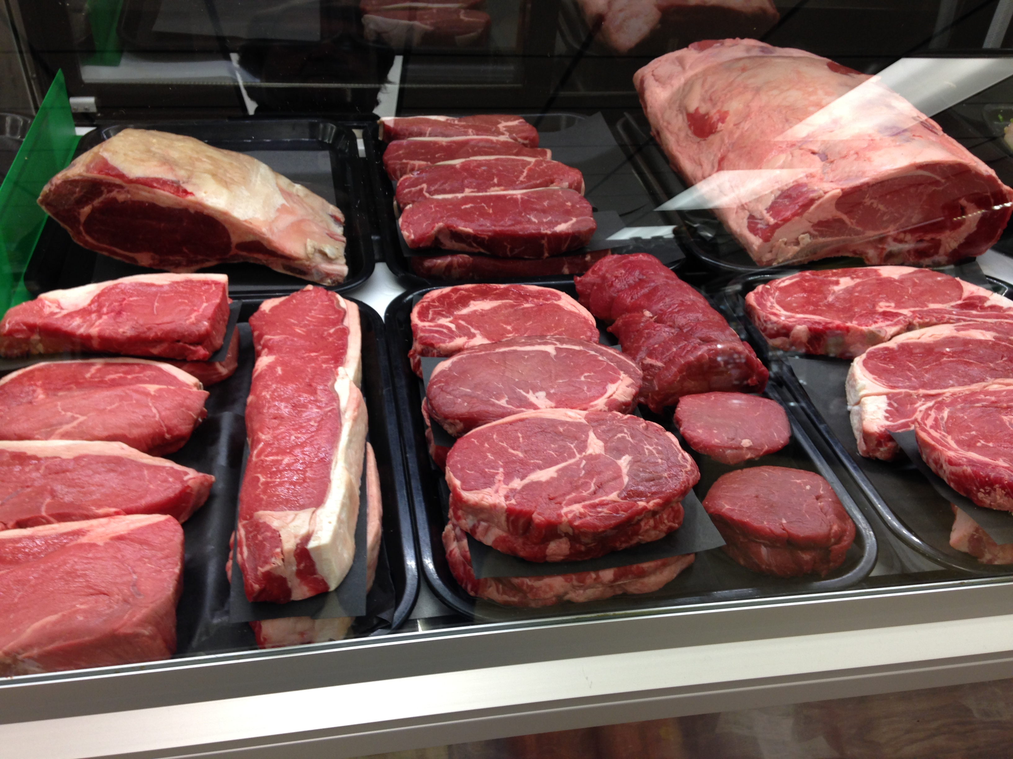 Ottawa Canada